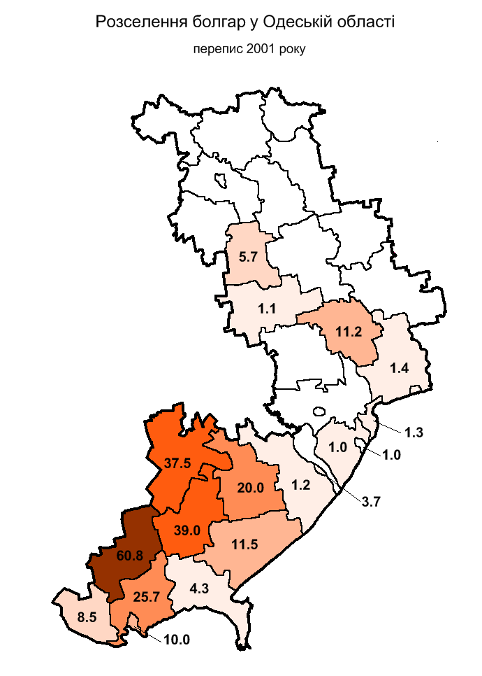 Розселення болгар в Одеській області за переписом 2001 р. / Bulgarians in Odesa oblast, 2001 census